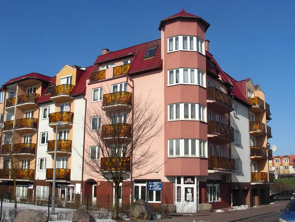 Zabudowa na osiedlu Górzyskowo w Bydgoszczy